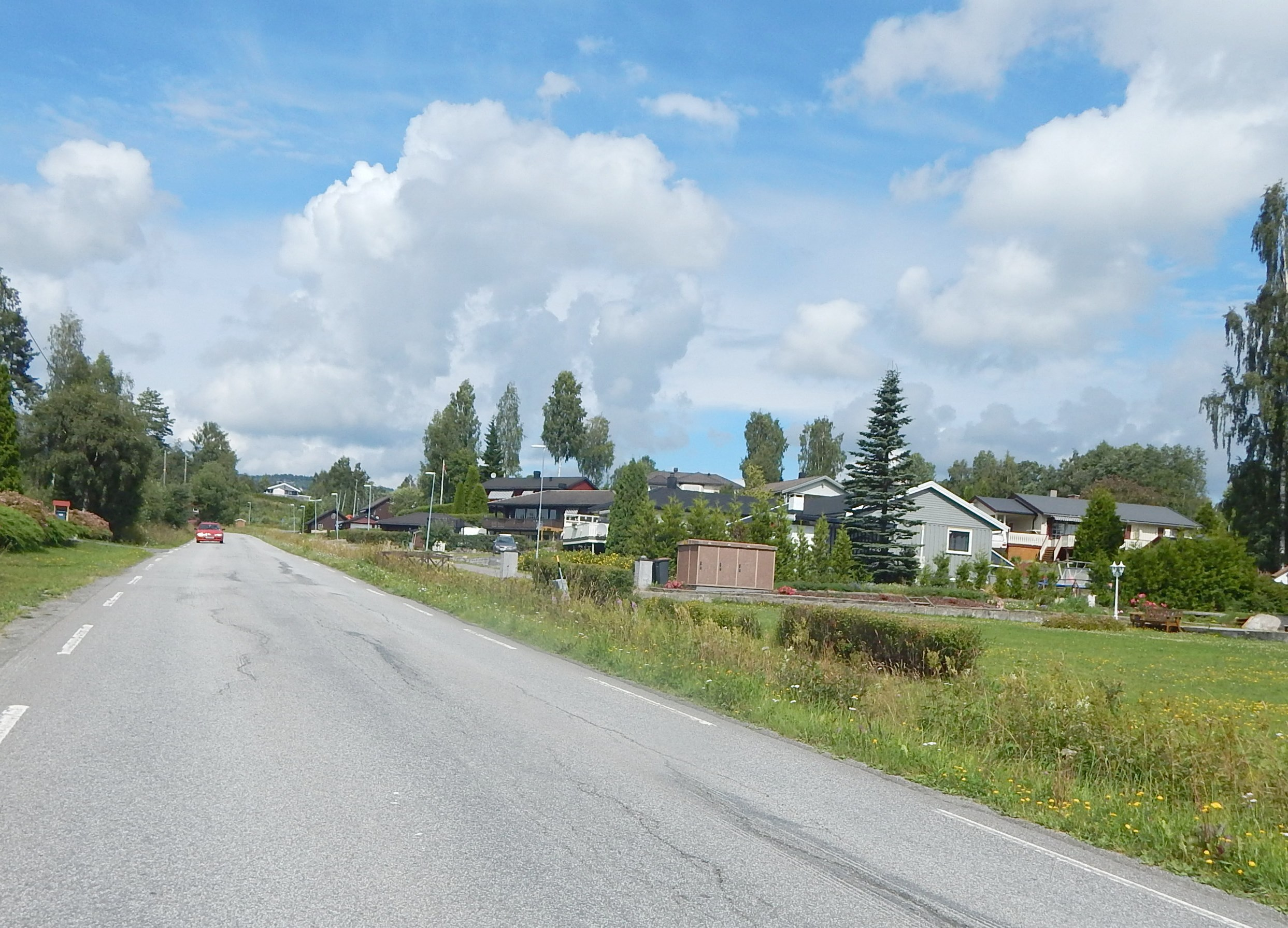 Gjerluvegen (fylkesvei 1726, tidl. 58)